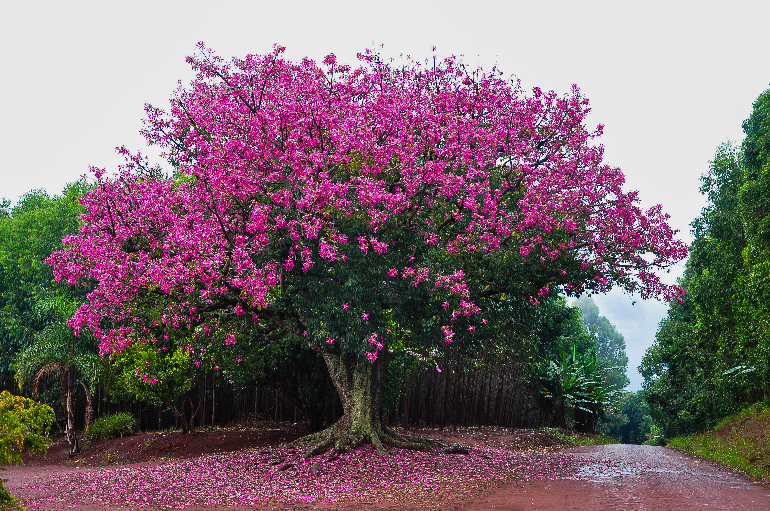 Paineira Florecendo